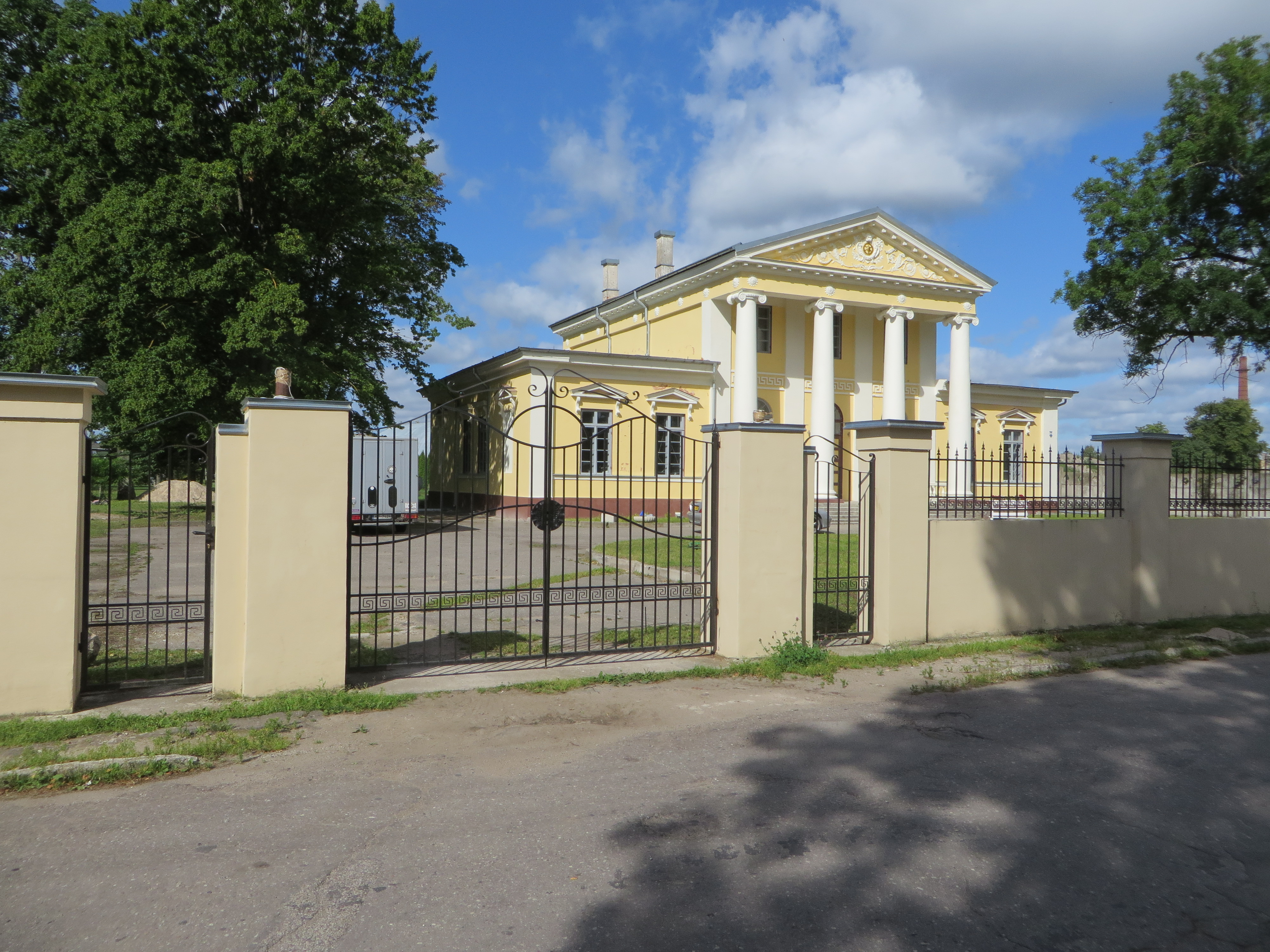 Dzīvojamā ēka "Villa Medem" ar dārzu, Jelgava, Uzvaras iela 55